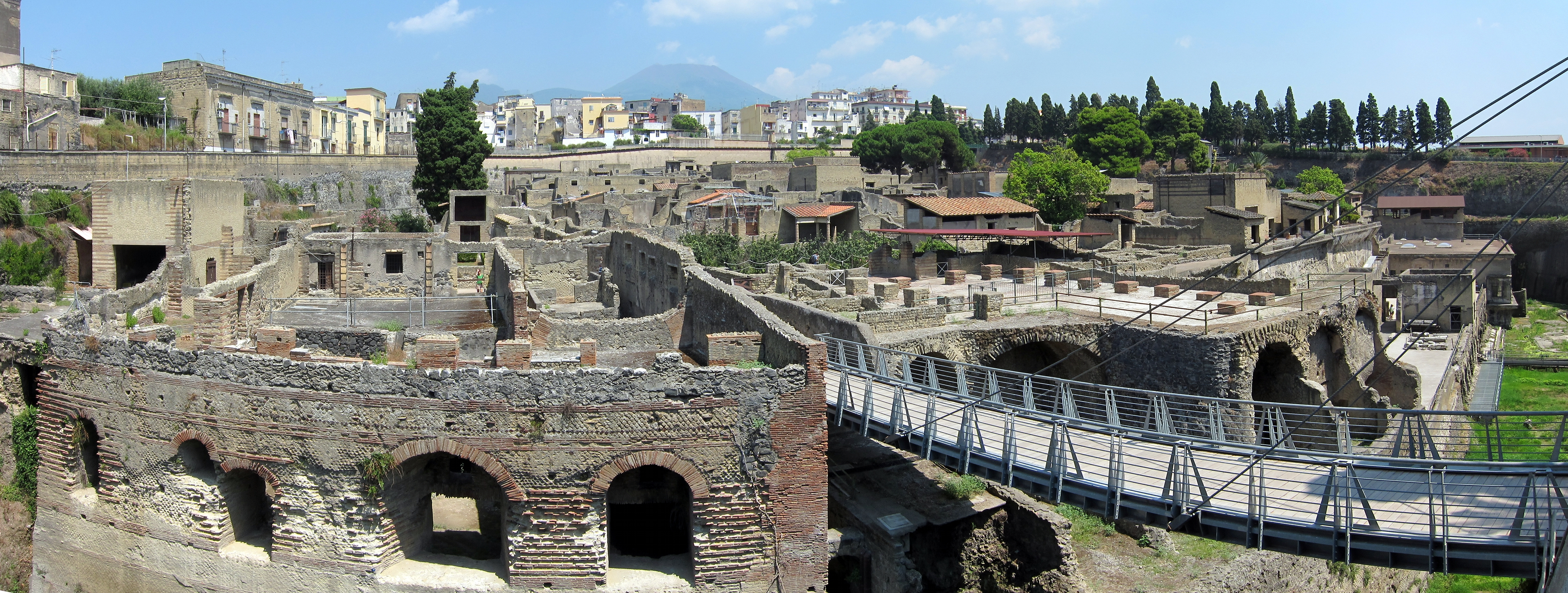 Vue d'ensemble du site d'Herculanum (en direction du Vésuve).